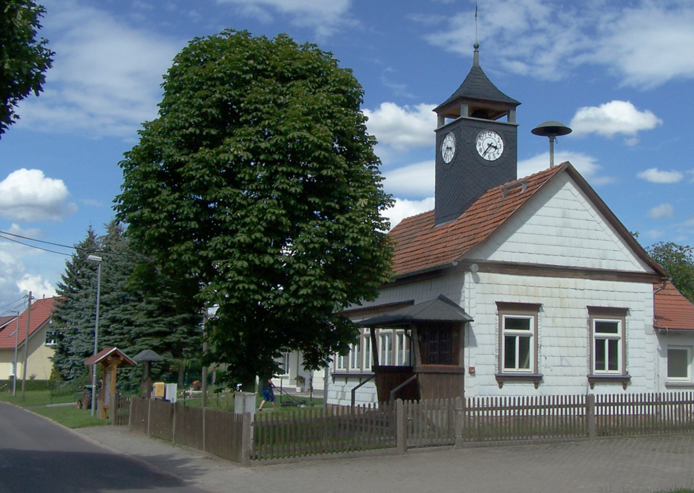 Die ehemalige Dorfschule in Sondra, OT von Sättelstädt in der Gemeinde Hörselberg-Hainich.